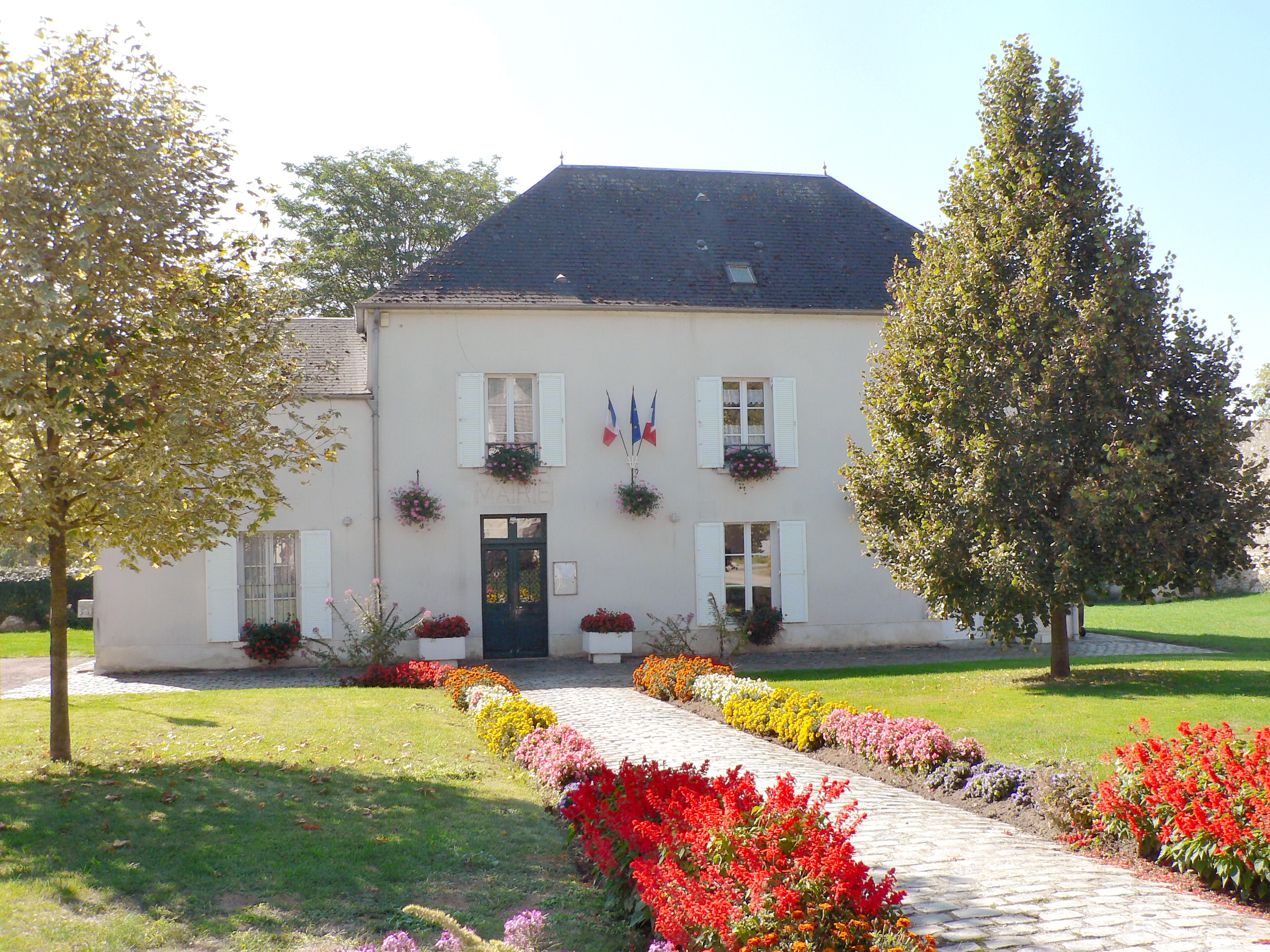 inaugurée en 1994.